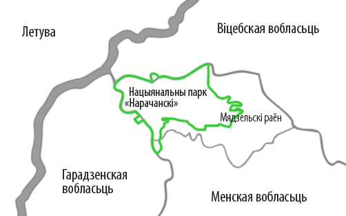 Беларуская (тарашкевіца): Разьмяшчэньне нацыянальнага парку «Нарачанскі» на мапе